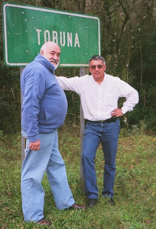 Tobuna es una localidad argentina ubicada en el departamento San Pedro de la Provincia de Misiones. Depende administrativamente del municipio de San Pedro, de cuyo centro urbano dista unos 36 kilómetros. En la foto: los escritores Esteban Abad y Marcelo Moreyra (oriundo de Tobuna), en un encuentro literario.